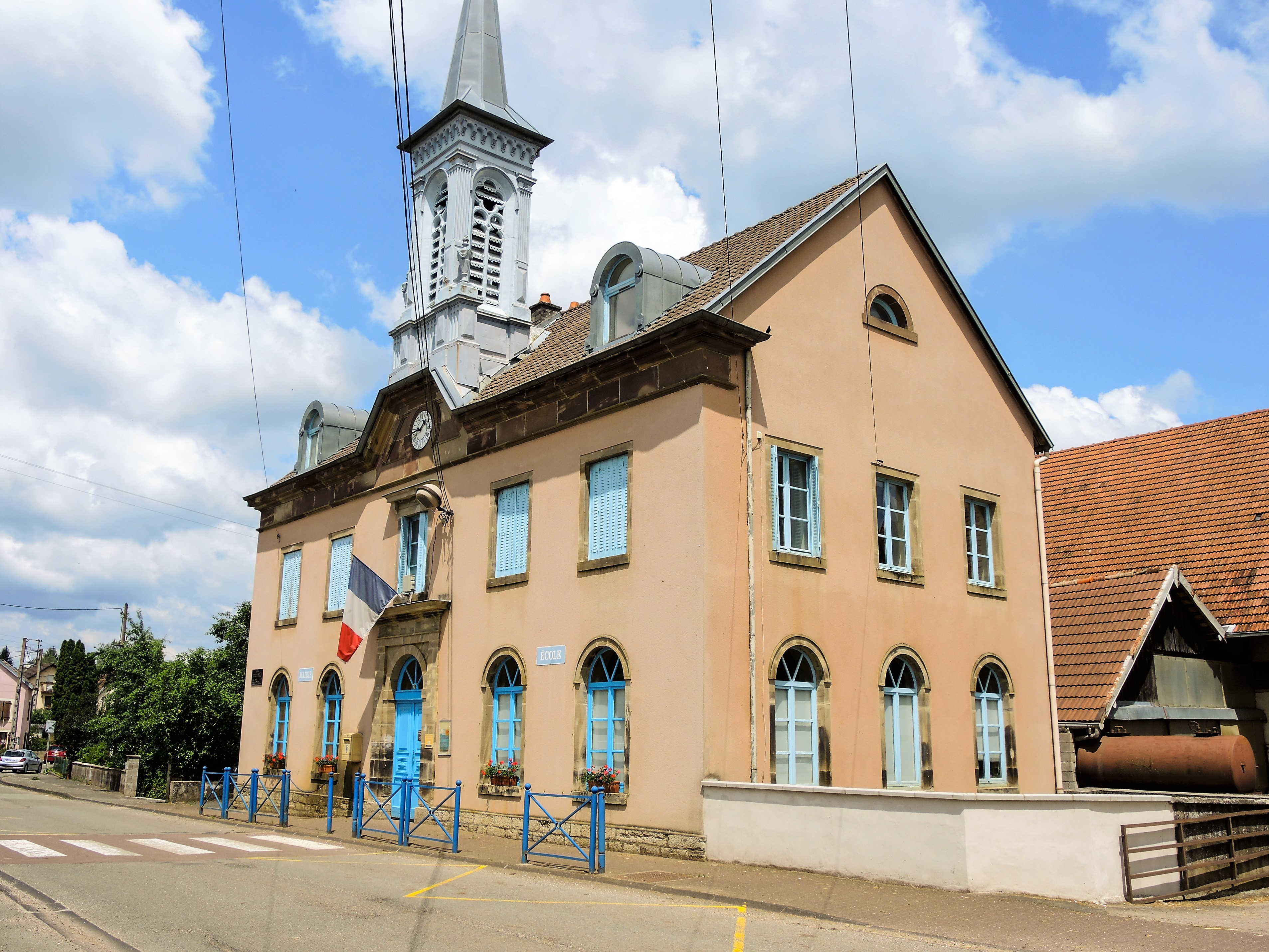 Marie-école du village d'Issans. Doubs